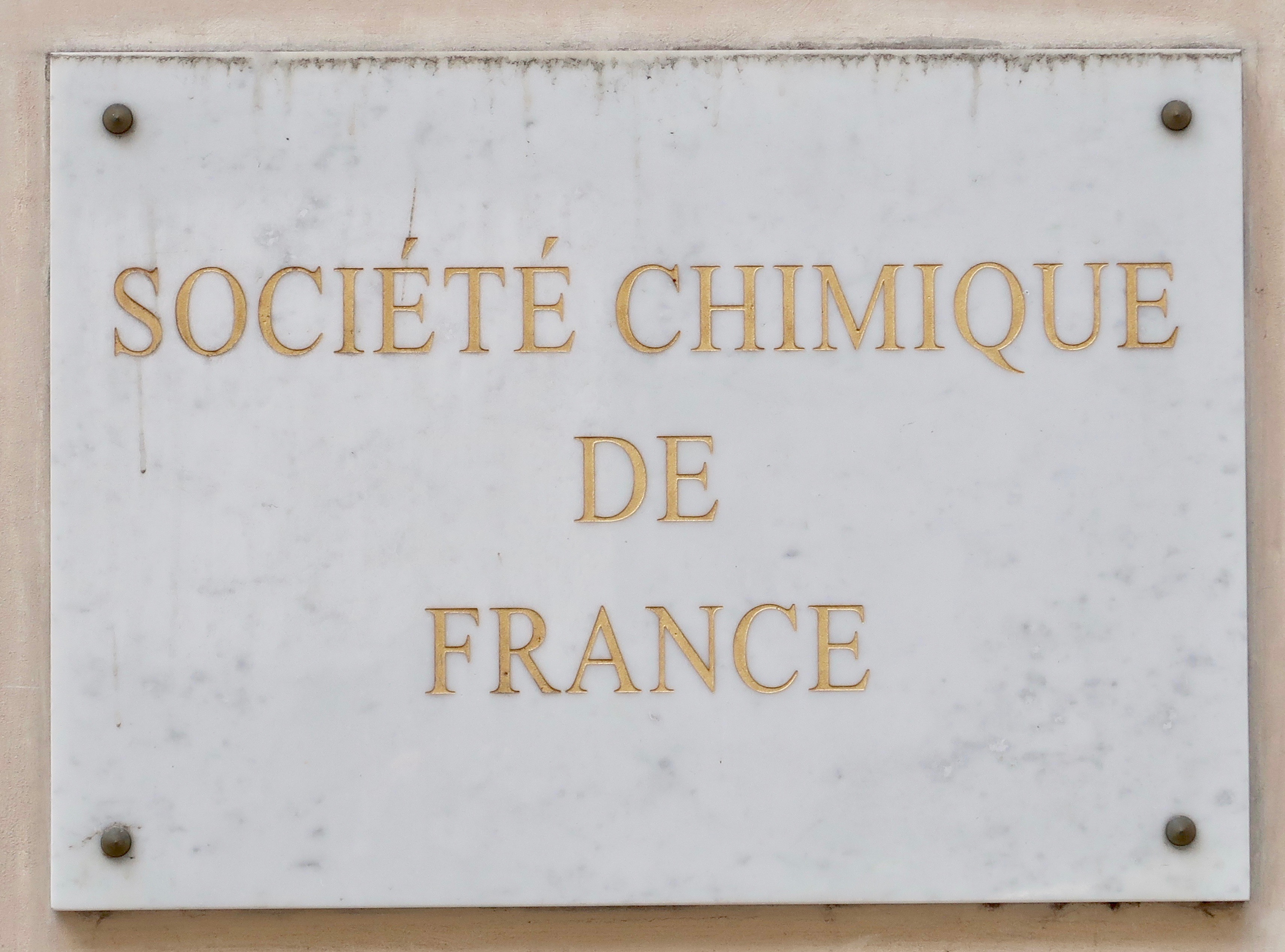 Plaque de la Société chimique de France, n°250 rue Saint-Jacques (Paris, 5e).